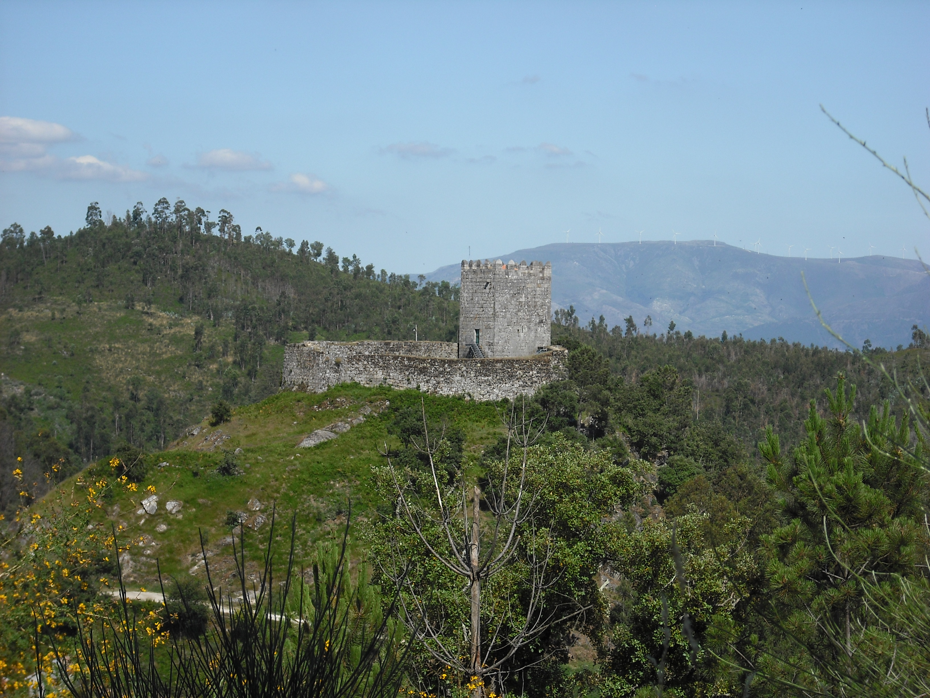 Vue sur le chateau de Celorico de Basto